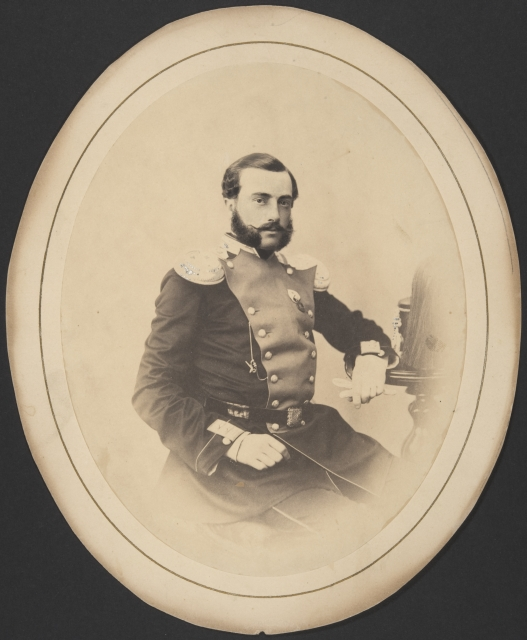 Constantin Linder (1836-1908)